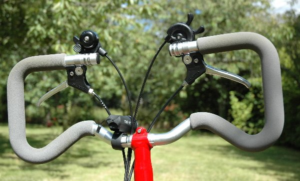 Guidon Brompton de type P